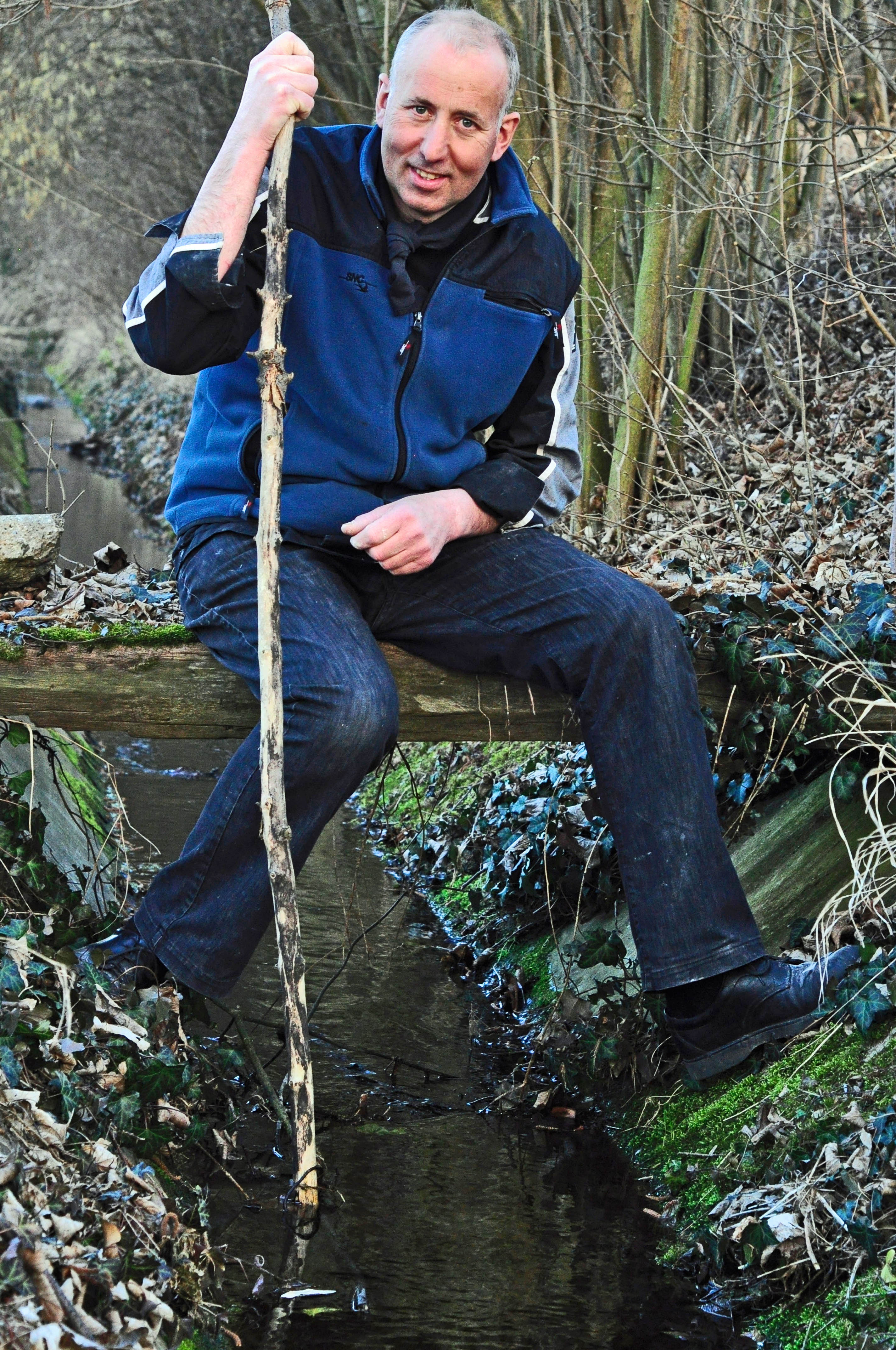 Hubert sonde le ruisseau éponyme de son hôtelrestaurant